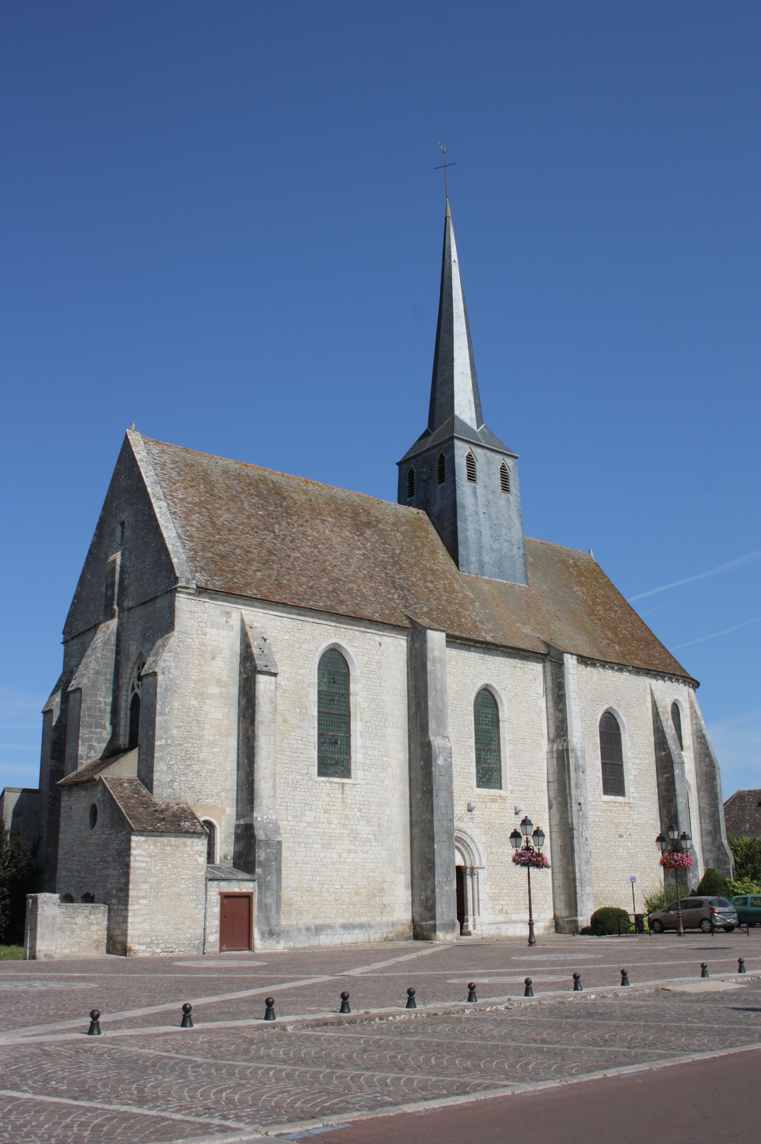 Katholische Pfarrkirche Saint-Clair-Saint-Léger in Souppes-sur-Loing im Département Seine-et-Marne in der Region Île-de-France (Frankreich), Ansicht von Süden